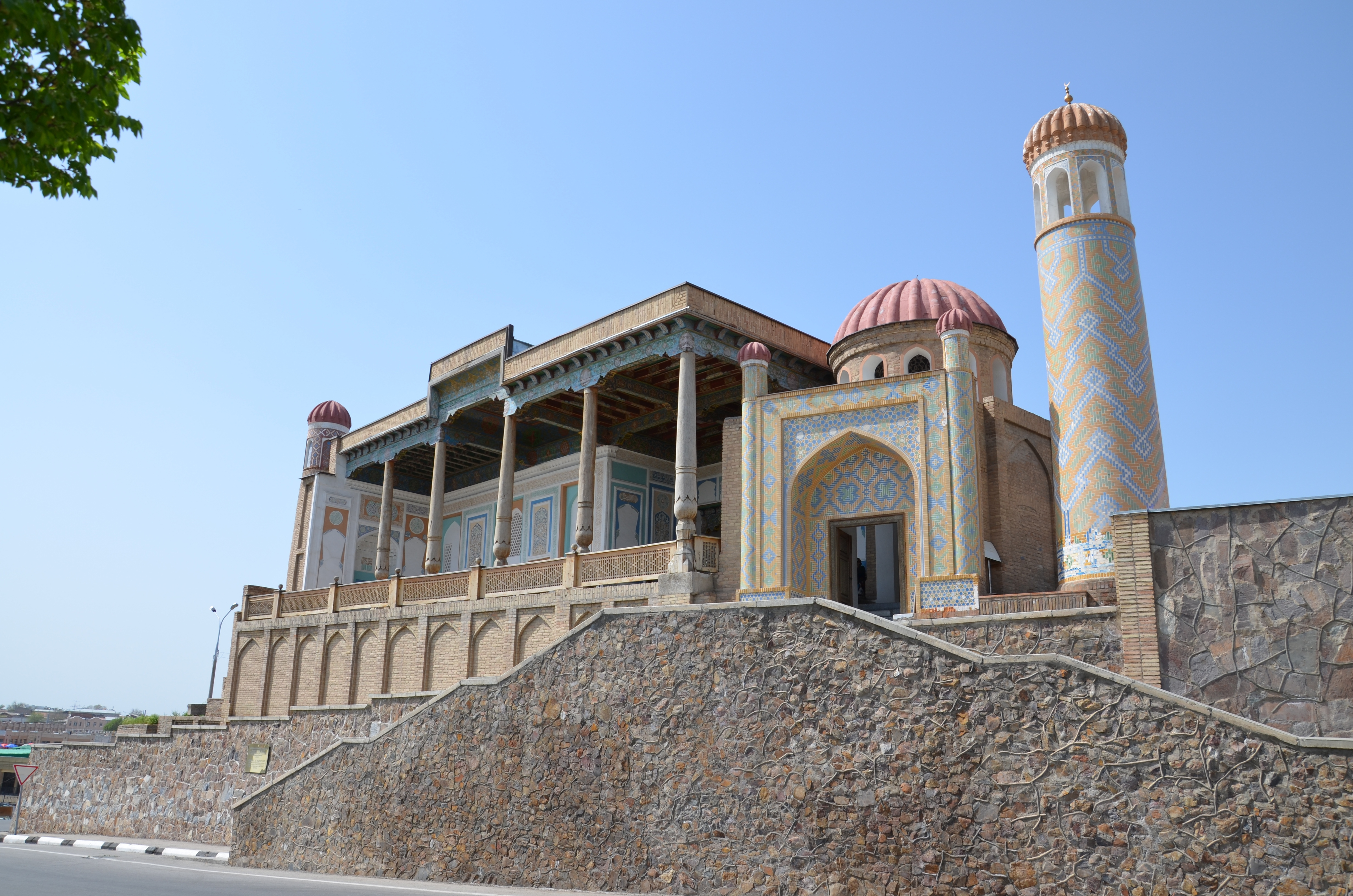 Mosque Hazrat-Hyzr Мечеть Хазрет-Хызр